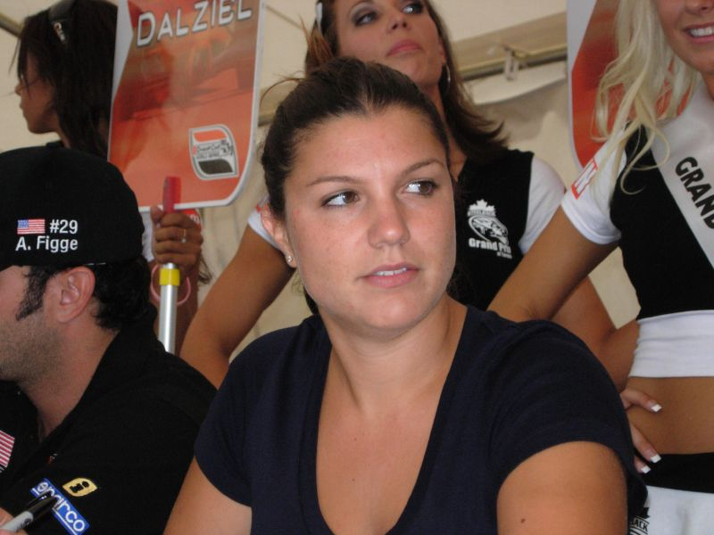 Katherine Legge in 2007.